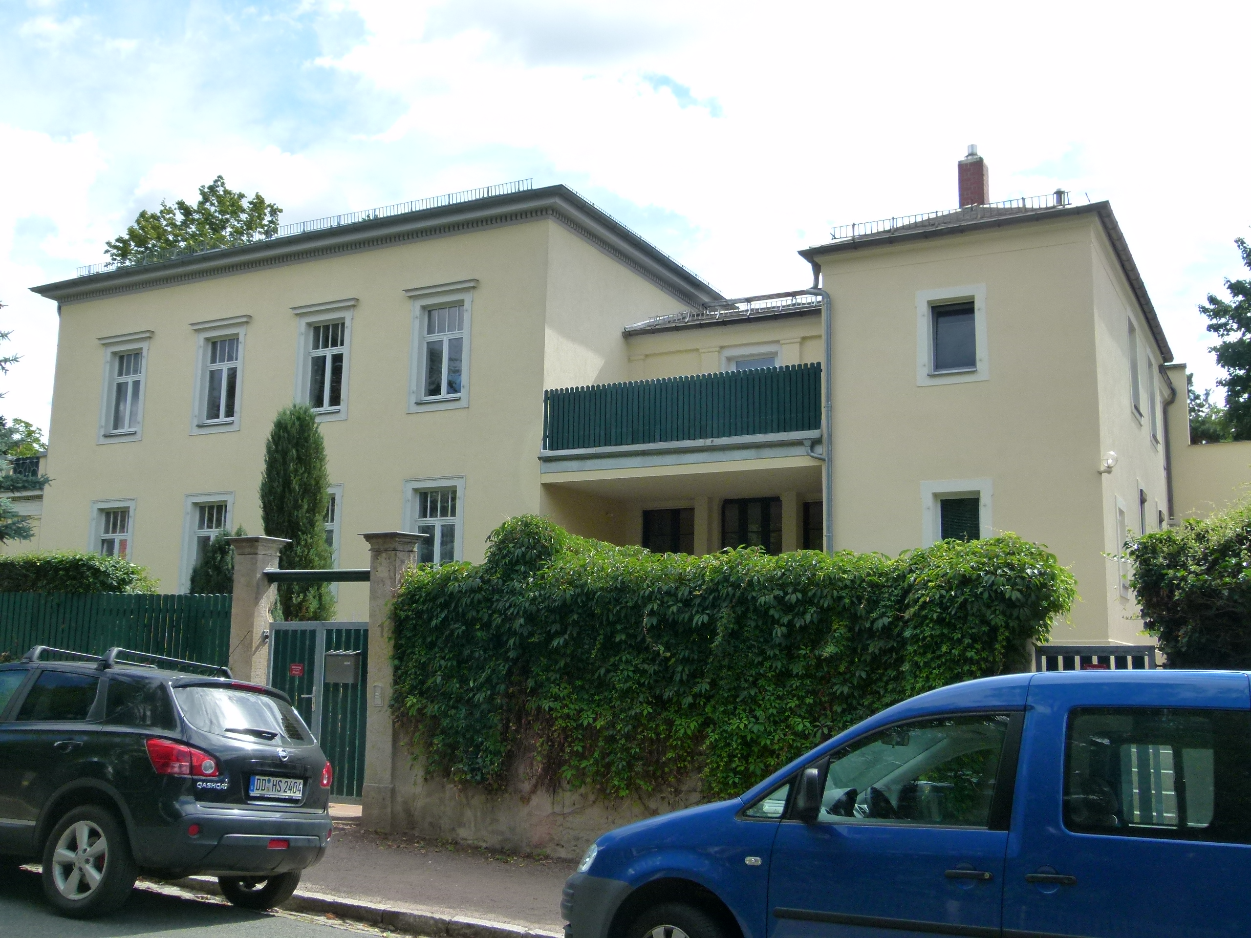 Denkmalgeschütztes Haus, Augustusweg 1, Radebeul, Sachsen